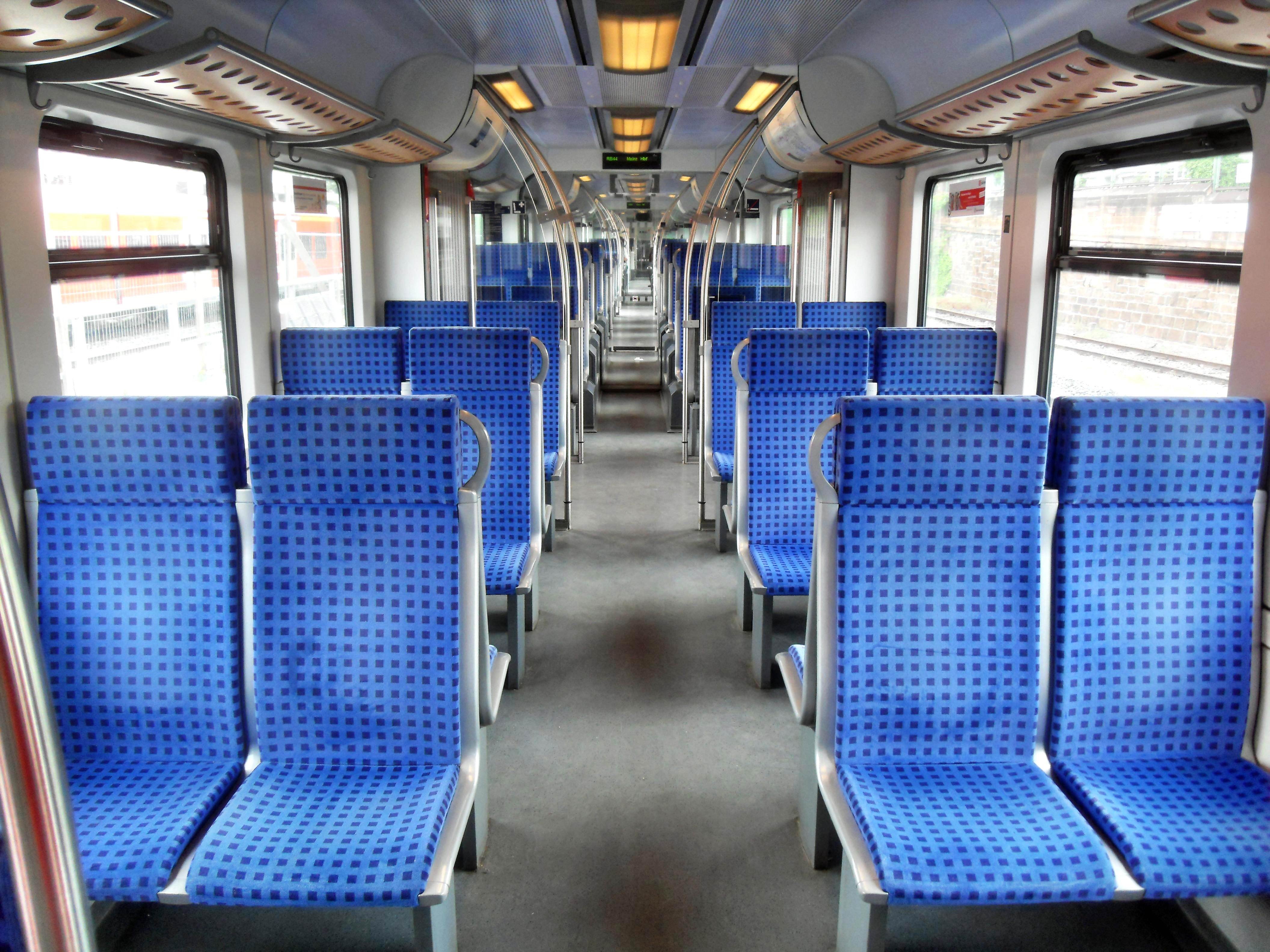 Interieur der 2. Klasse der DBAG-Baureihe 425. Der Zug steht im Wormser Hauptbahnhof.